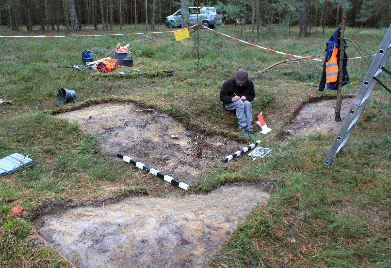 Ausgrabung der Republik Freies Wendland